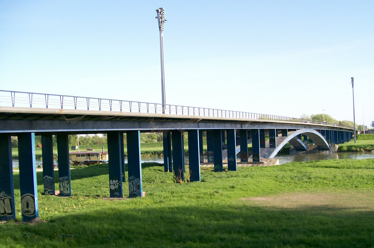 Most slobode Zagreb